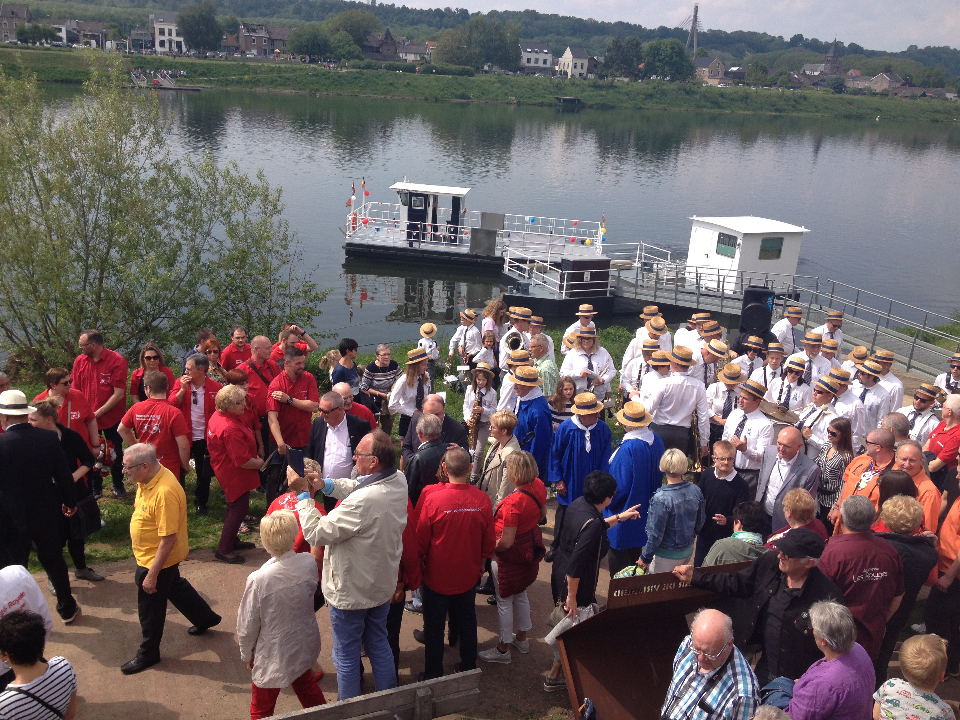 "Dag van de Cramignon" in Eijsden op 18 mei 2019. Waalse muzikanten en dansers van de Cramignon staken de Maas over met de veerpont "De Cramignon" om samen met Nederlandse muzikanten en dansers de Cramignon te spelen en dansen.